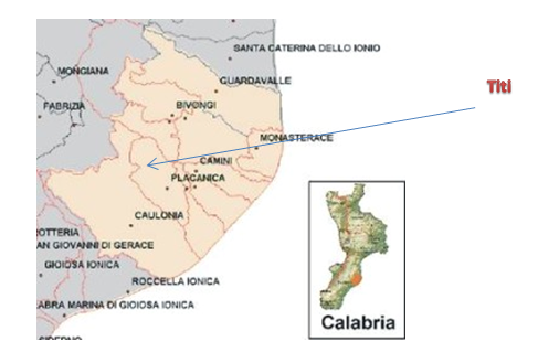 territori del D.O.C Bivongi